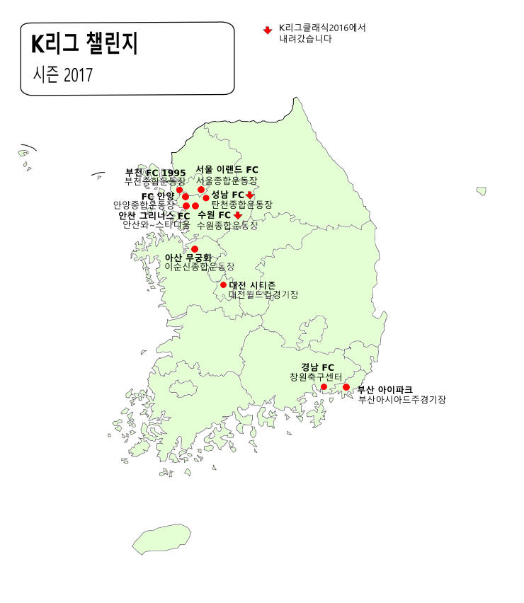 2017시즌의챌린지 경기장들